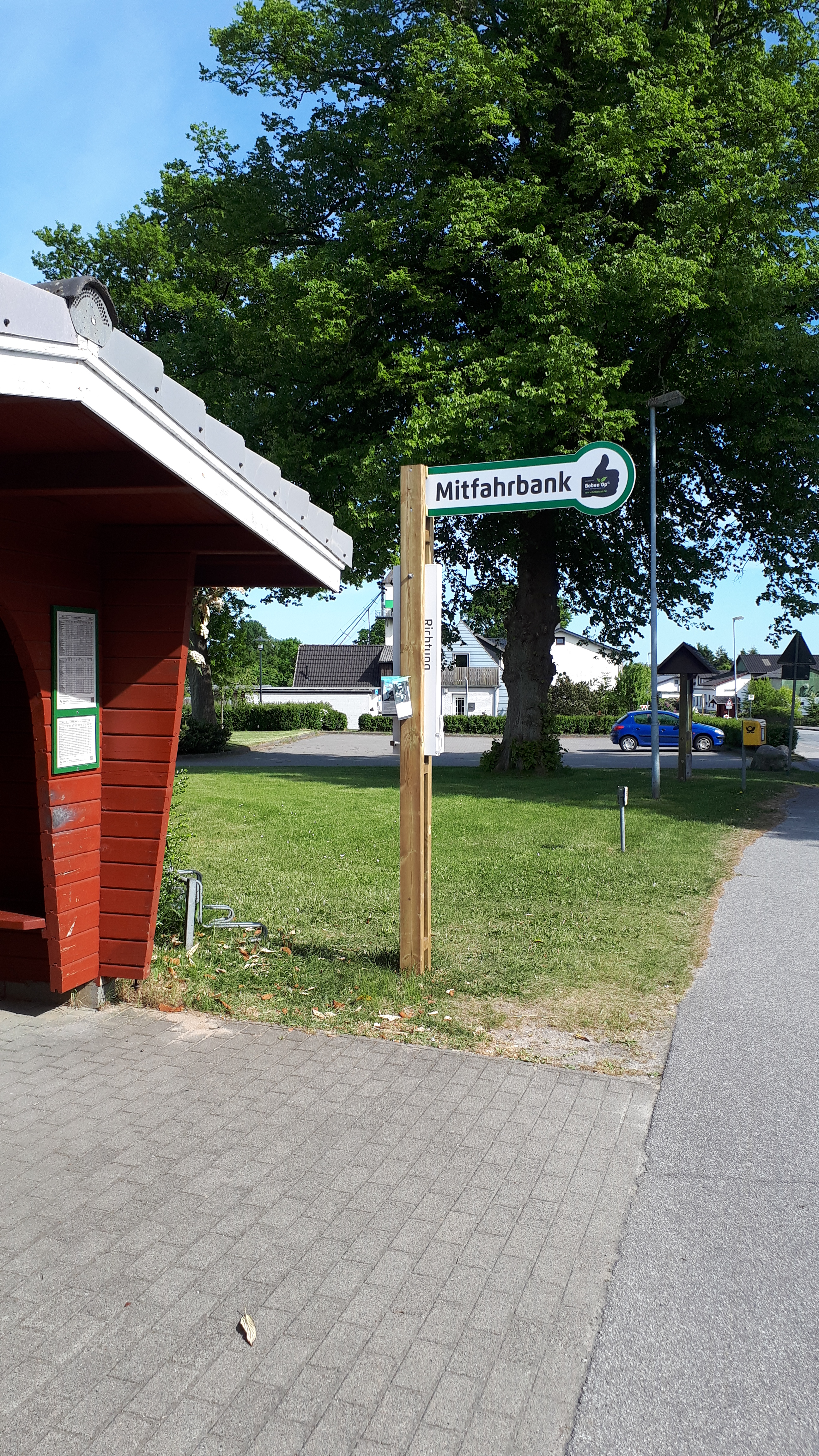 Mitfahrerbank in Freienwill, Kreis Schleswig-Flensburg